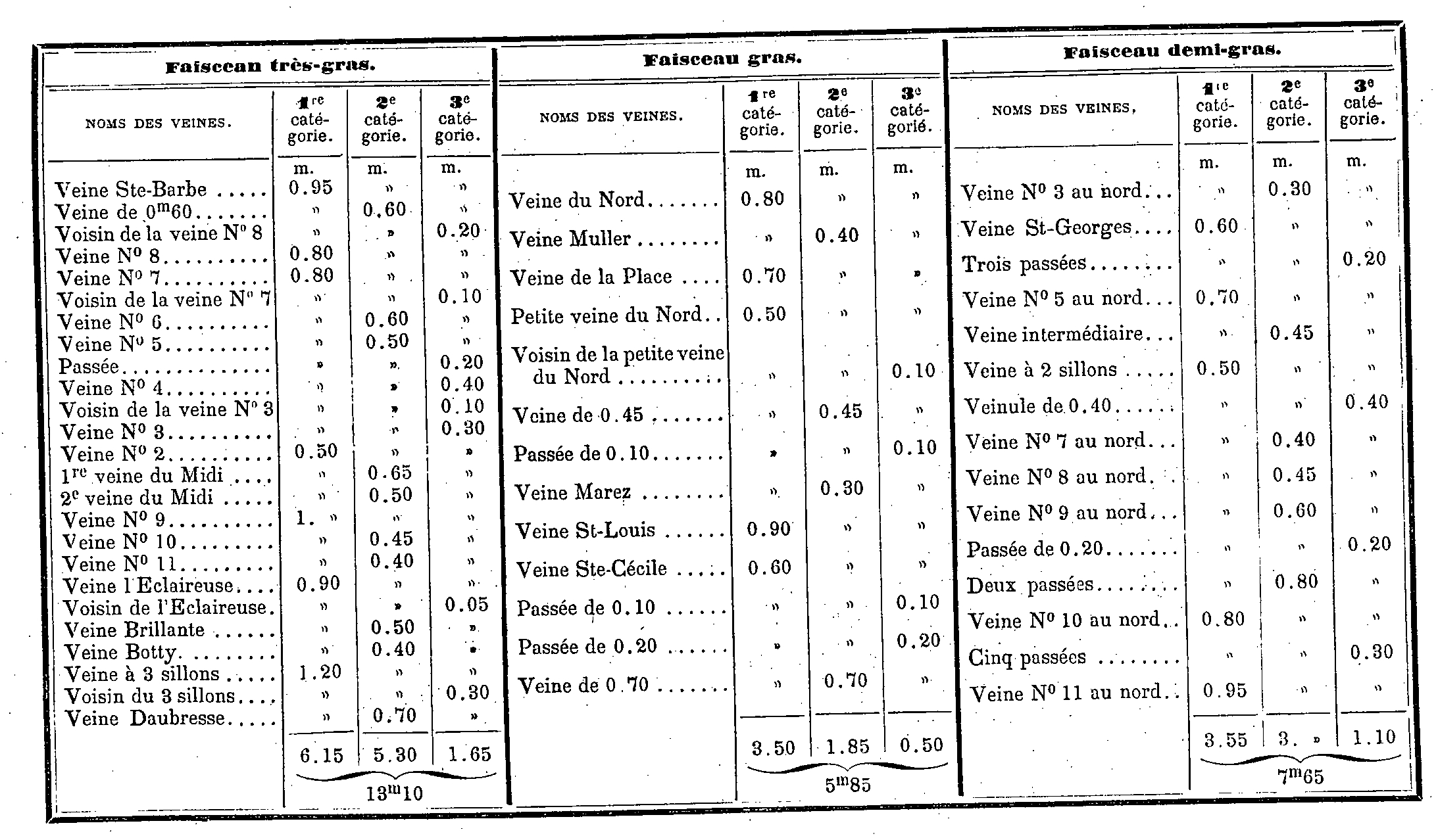 Compagnie des mines de Dourges.